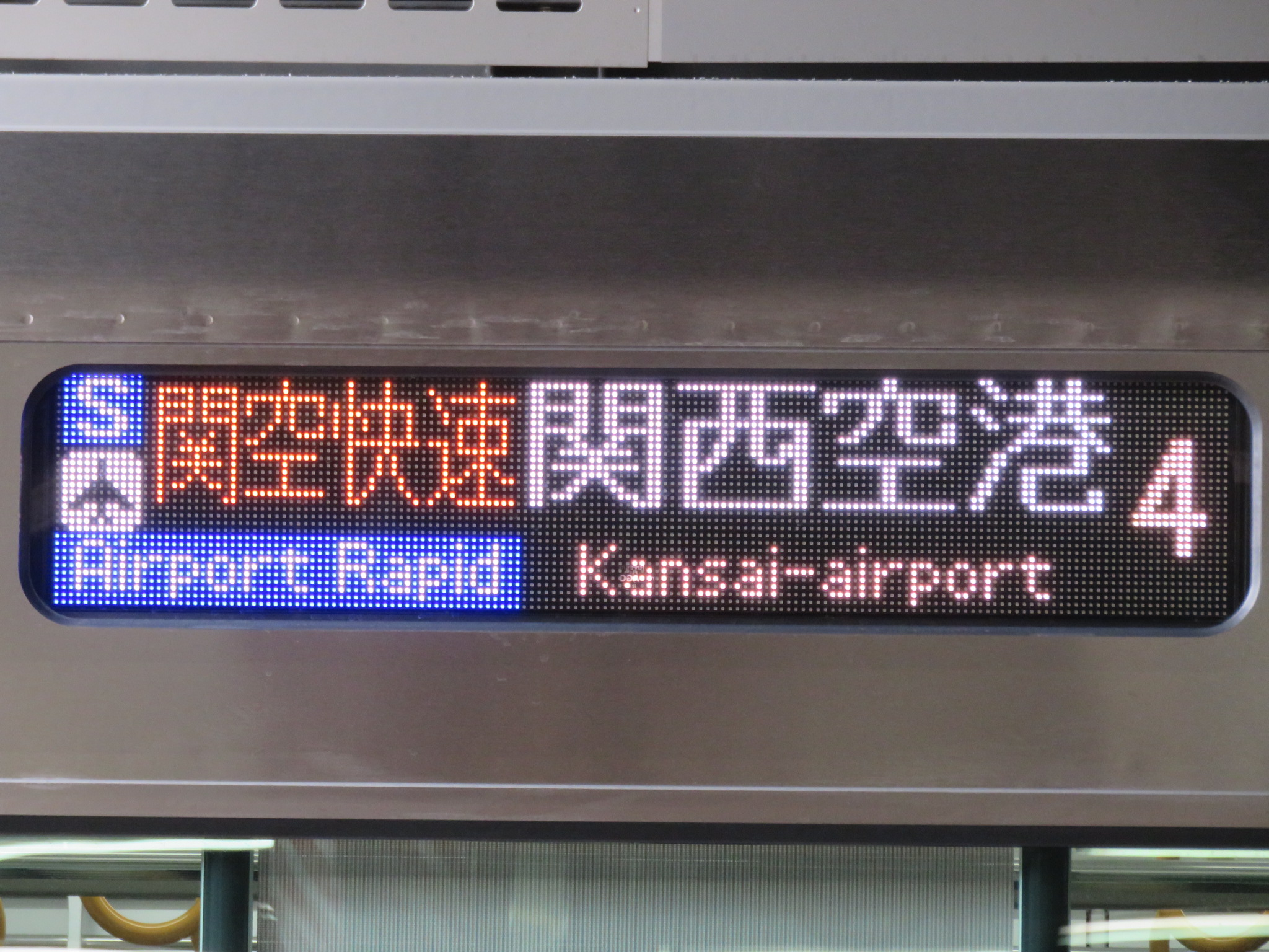 225系5100番台 側面幕